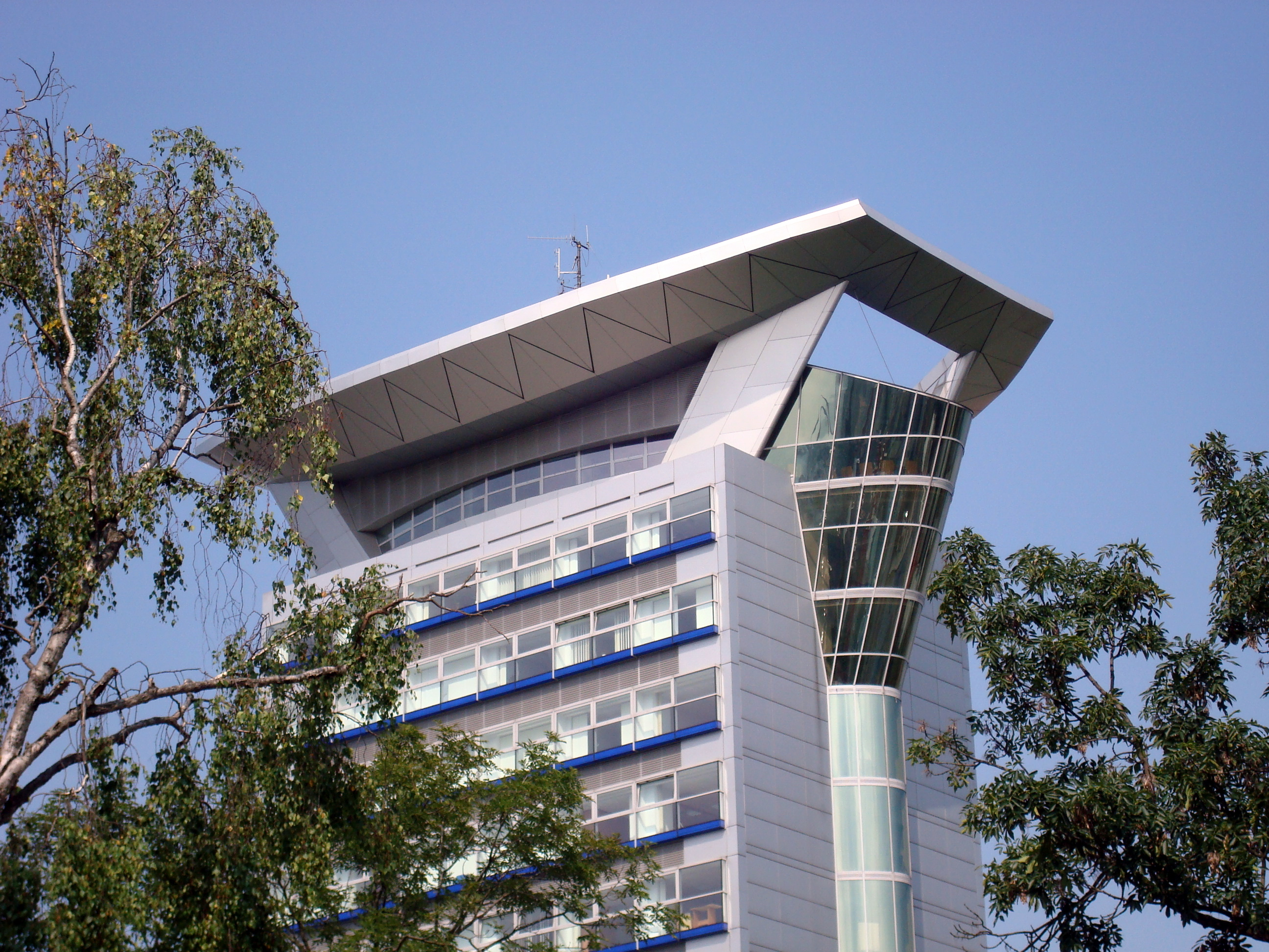 Ostrava, budova Severomoravské plynárenské